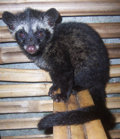 Paradoxurus hermaphroditus, juvenile, taken at Situgede, Bogor, Indonesia